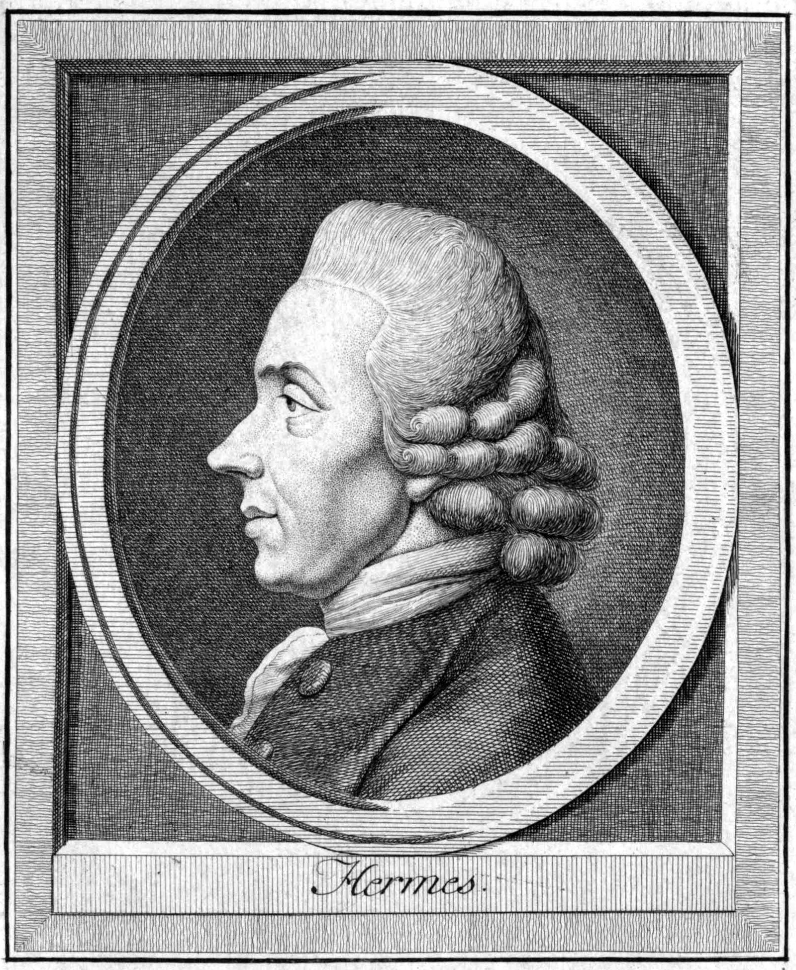 Portrait des Schriftstellers Johann Timotheus Hermes.